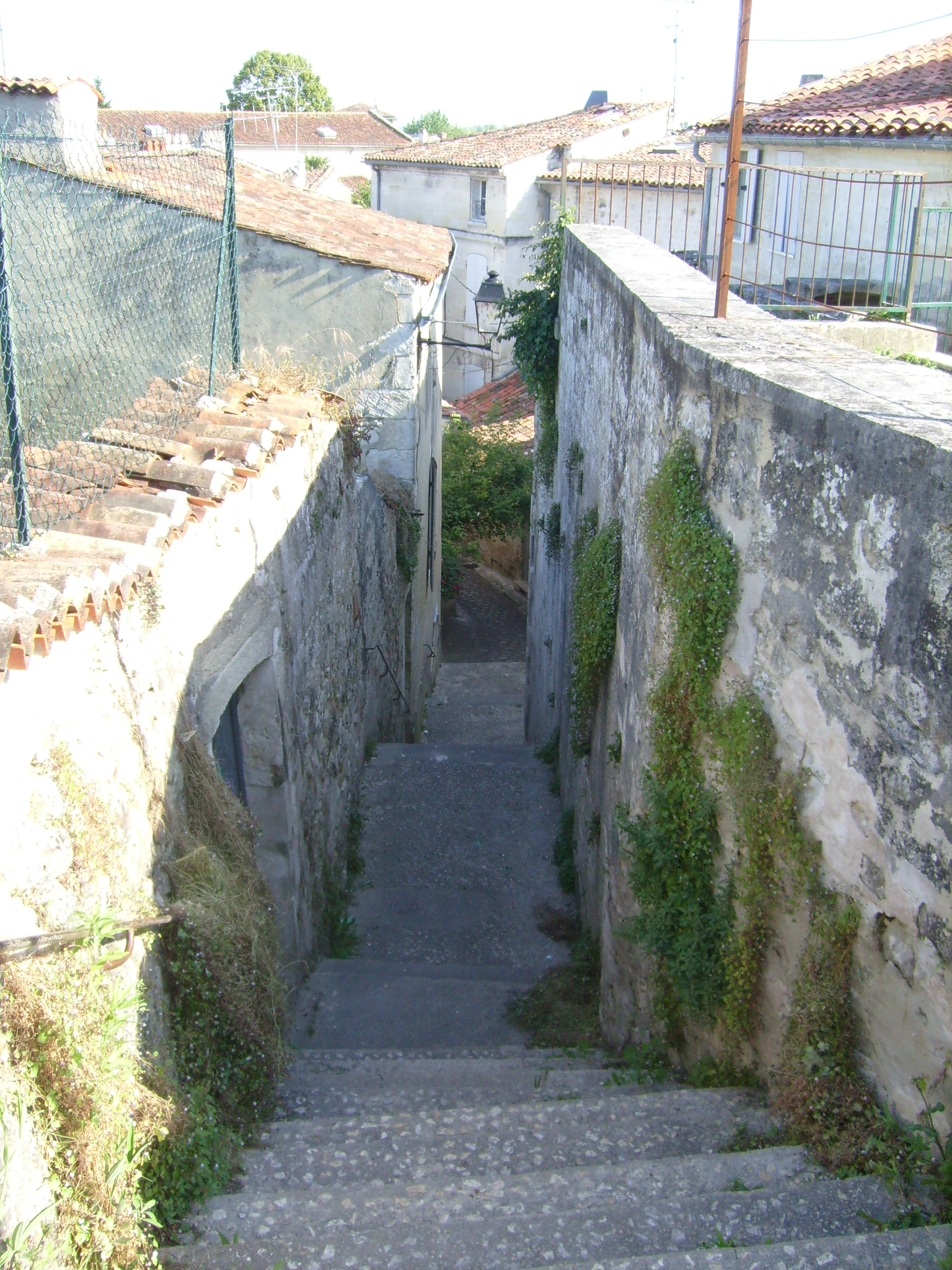 Ruelles du vieux-Saintes